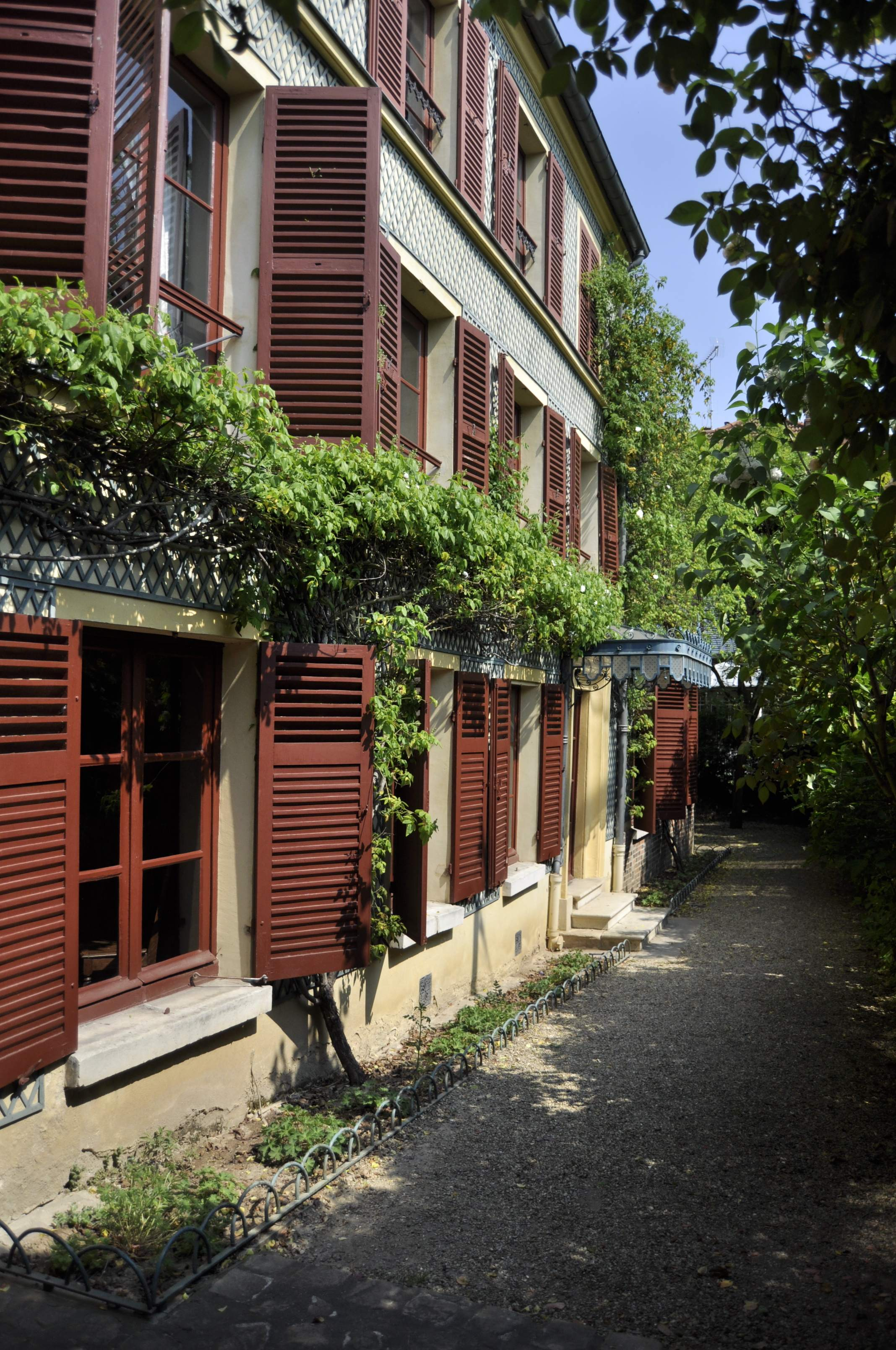 La façade sud (façade principale de la maison d'origine) de la maison des Jardies, aujourd'hui musée Gambetta, à Sèvres.